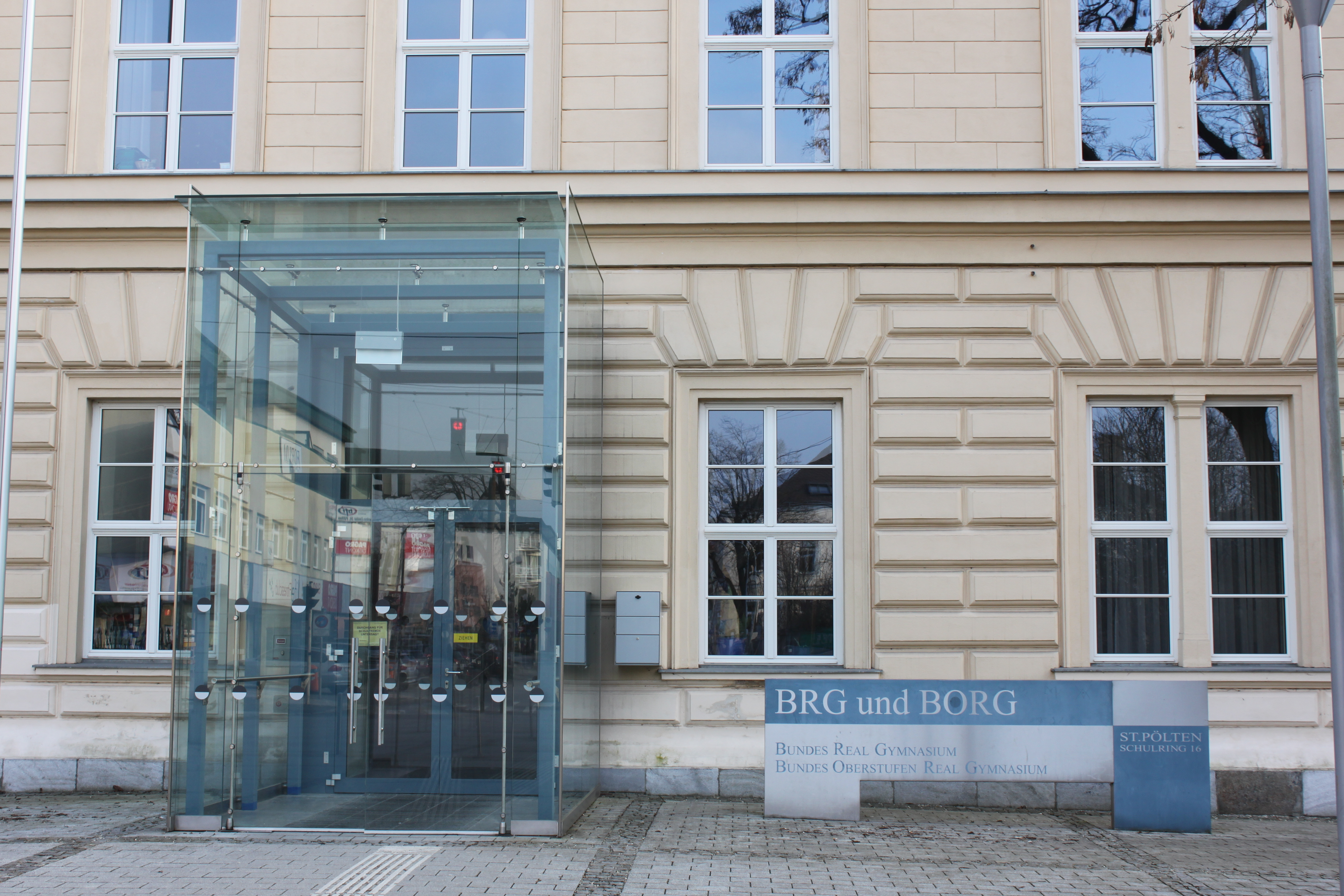 Bundesrealgymnasium und Bundesoberstufenrealgymnasium St. Pölten, Hauptfront